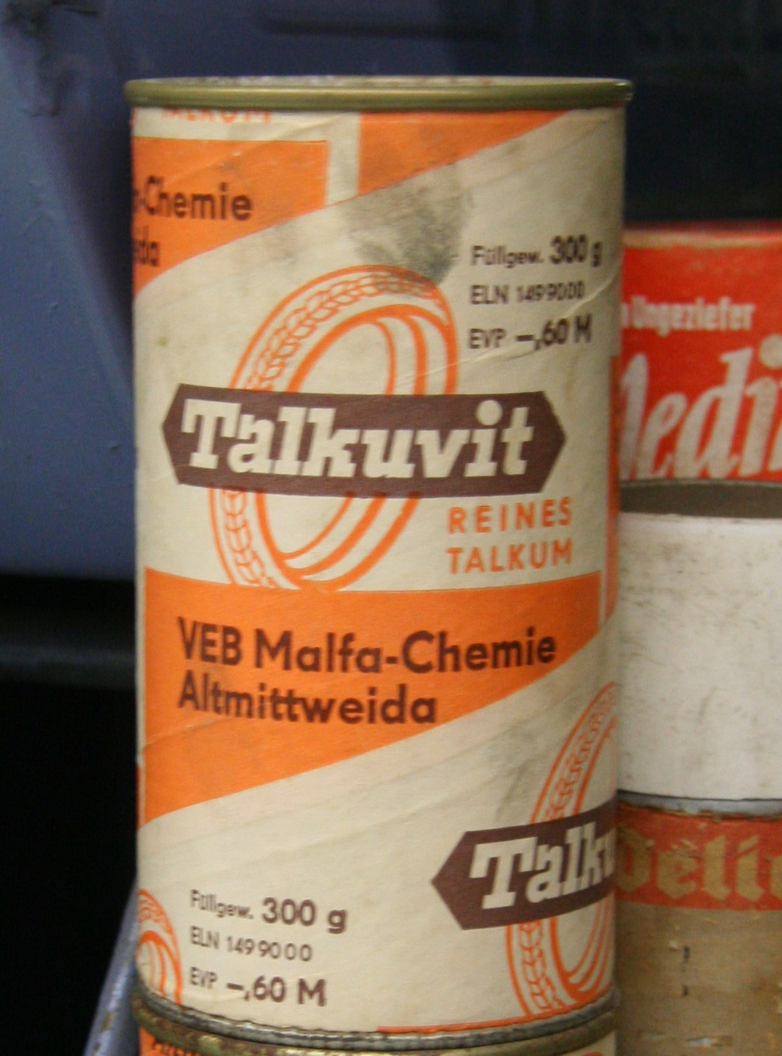 Talkuvit, Talkum für technische Verwendung, Produkt des VEB Malfa-Chemie Altmittweida